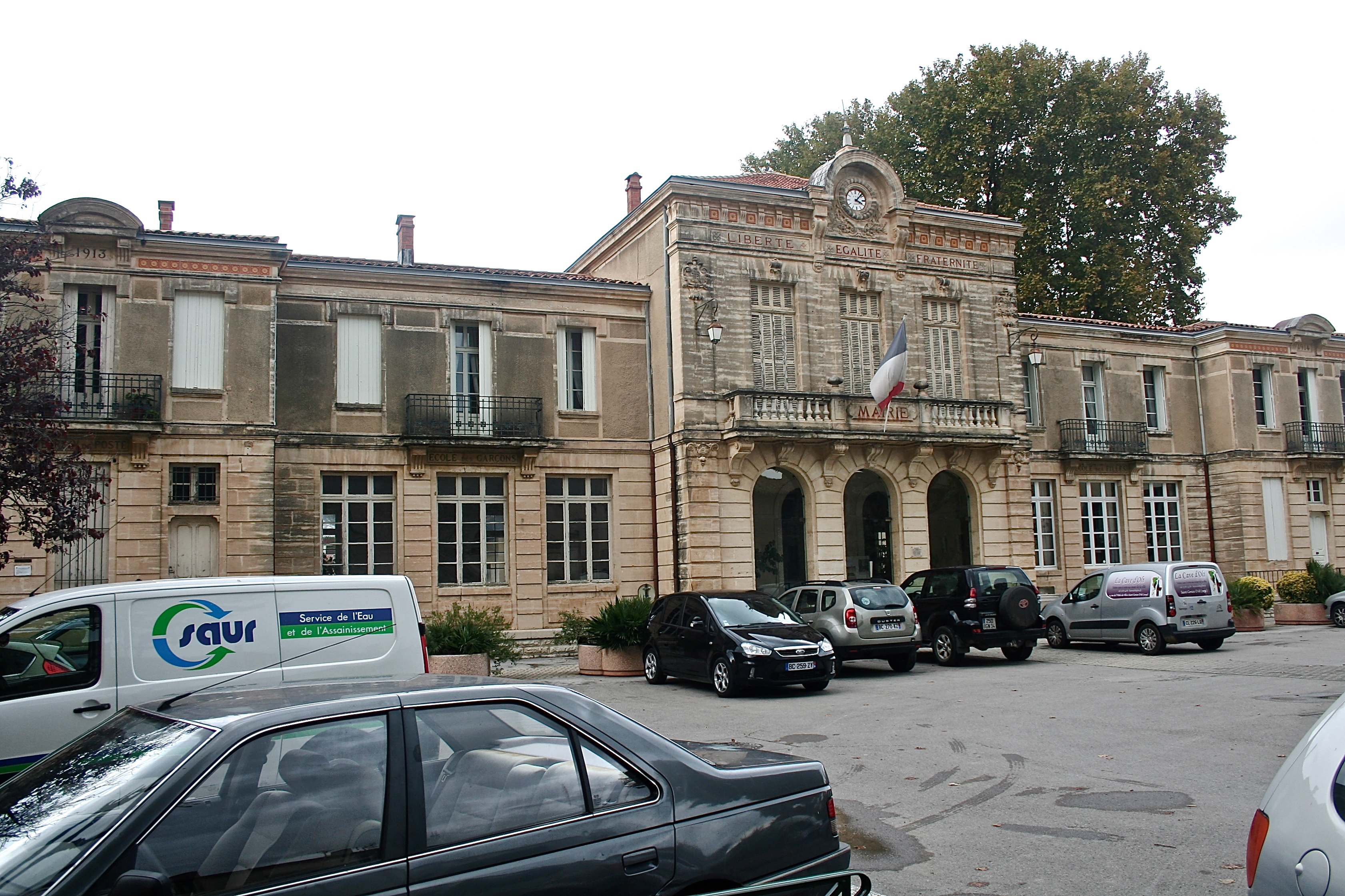 Lavérune (Hérault) - mairie